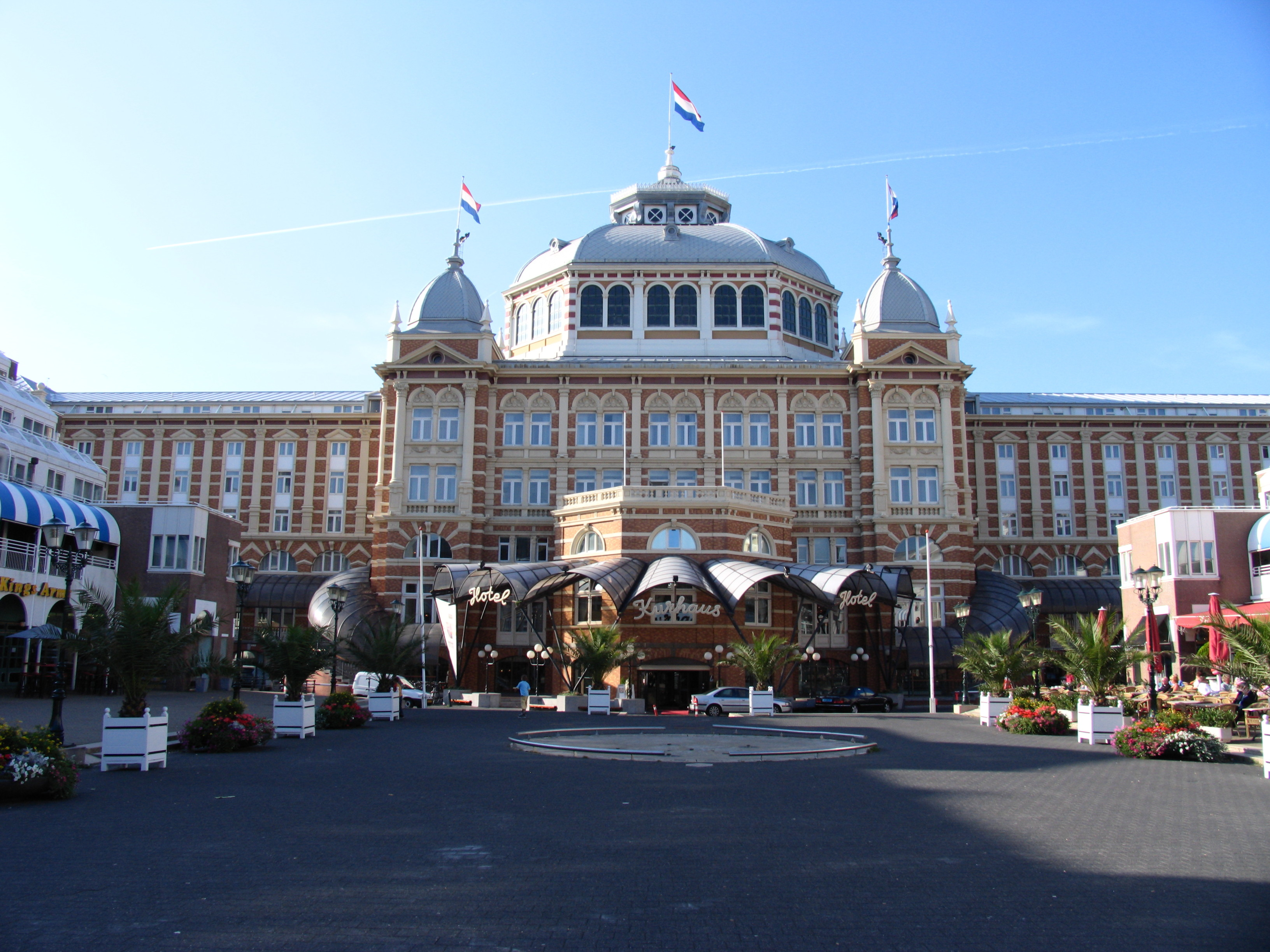 Den haag Kurhaus Hotel